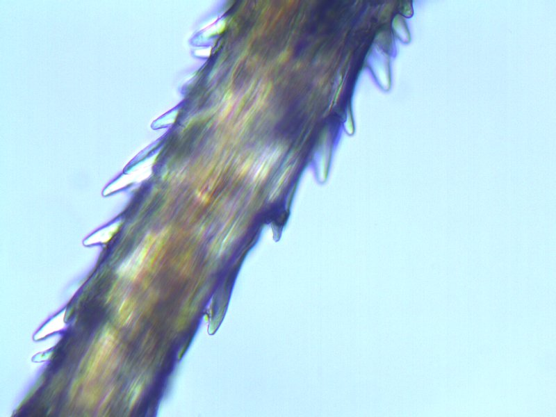 Haartragendes Frauenhaarmoos Polytrichum piliferum, Gezähntes Glashaar, Rostock